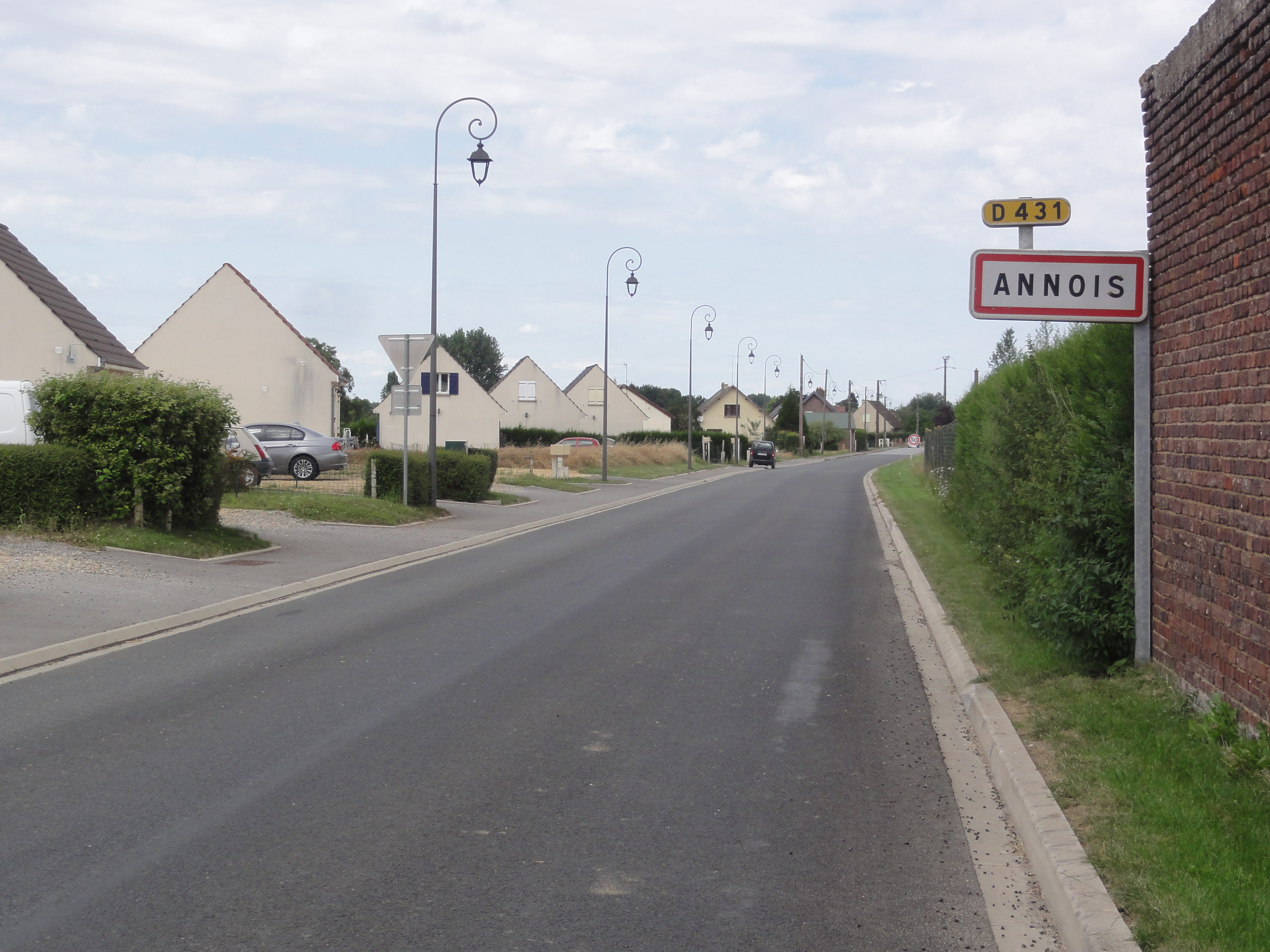 Annois (Aisne) city limit sign